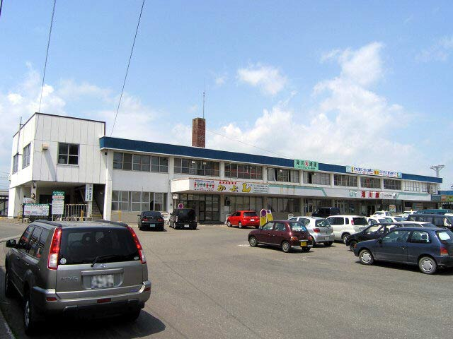 Takikawa Station, Japan